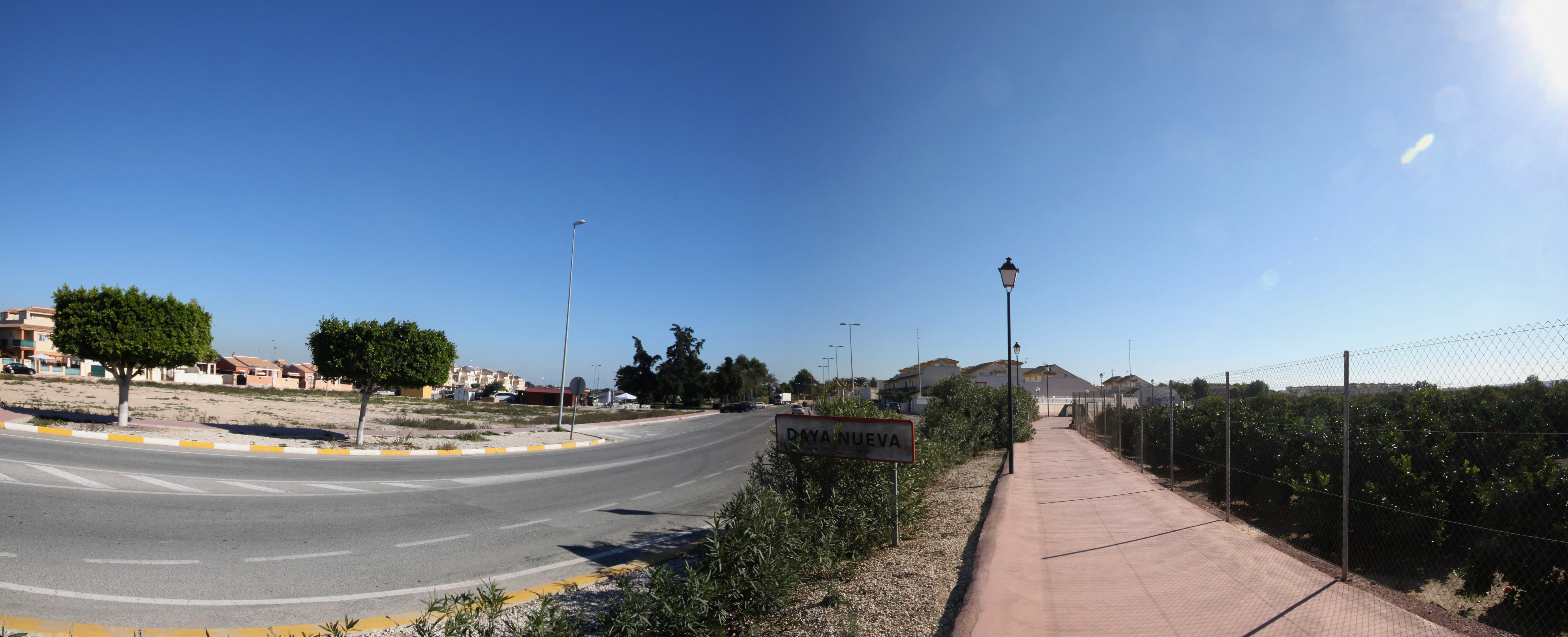 Daya Nueva - Panorámica de acceso y cartel